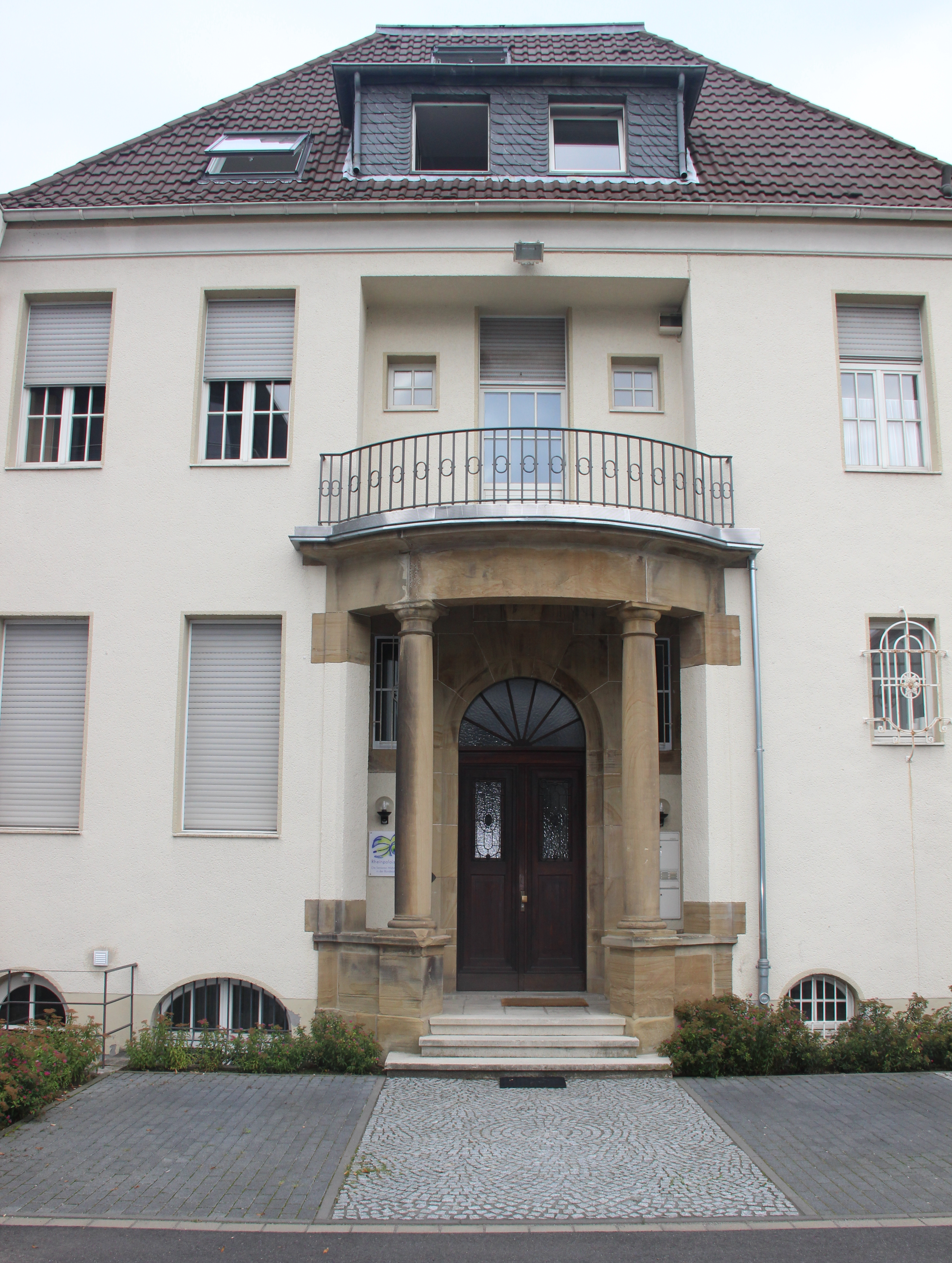 Villa, Schaumburg-Lippe-Straße 6, Bonn-Südstadt